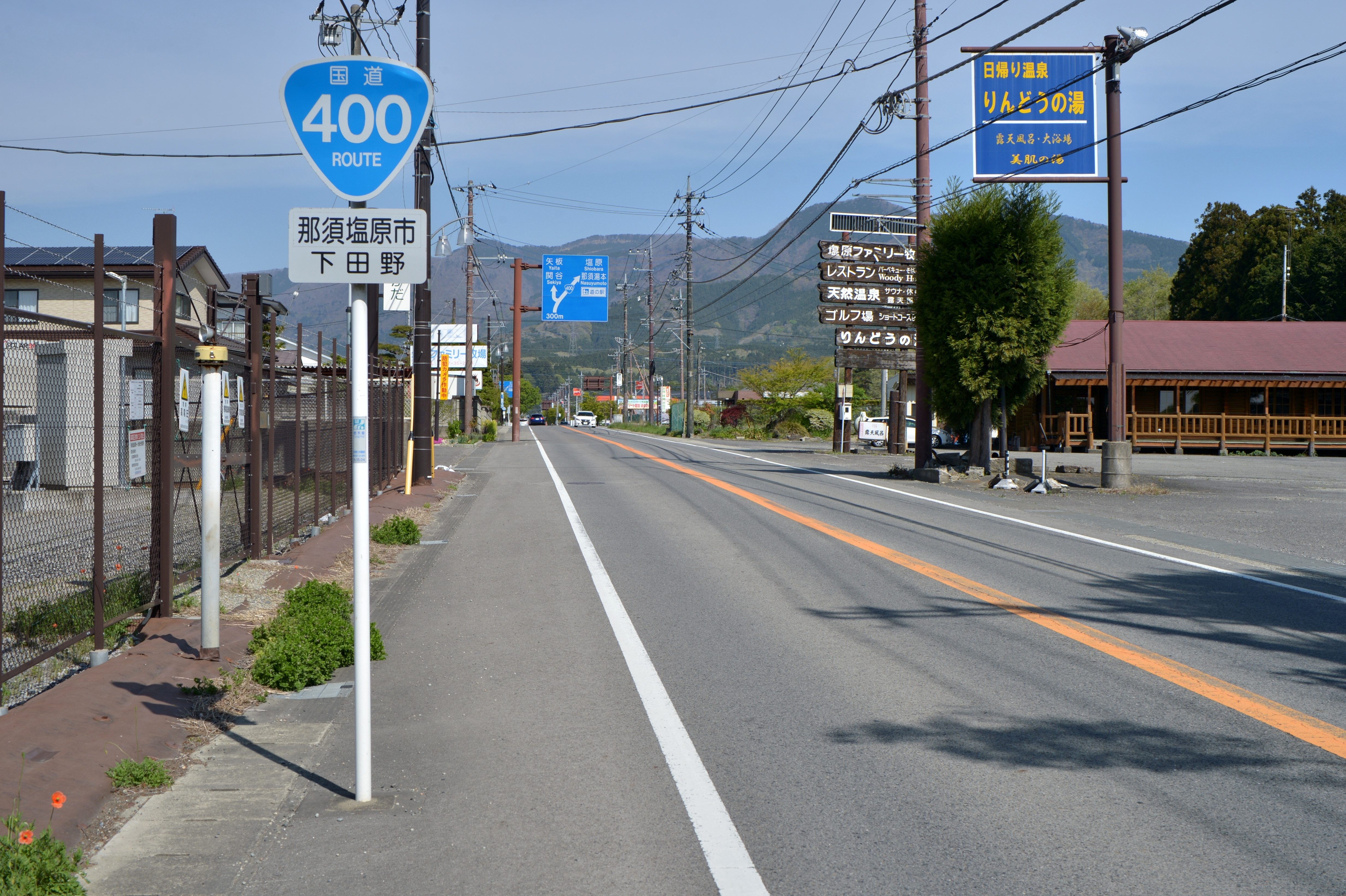 栃木県那須塩原市下田野の国道400号の国道標識